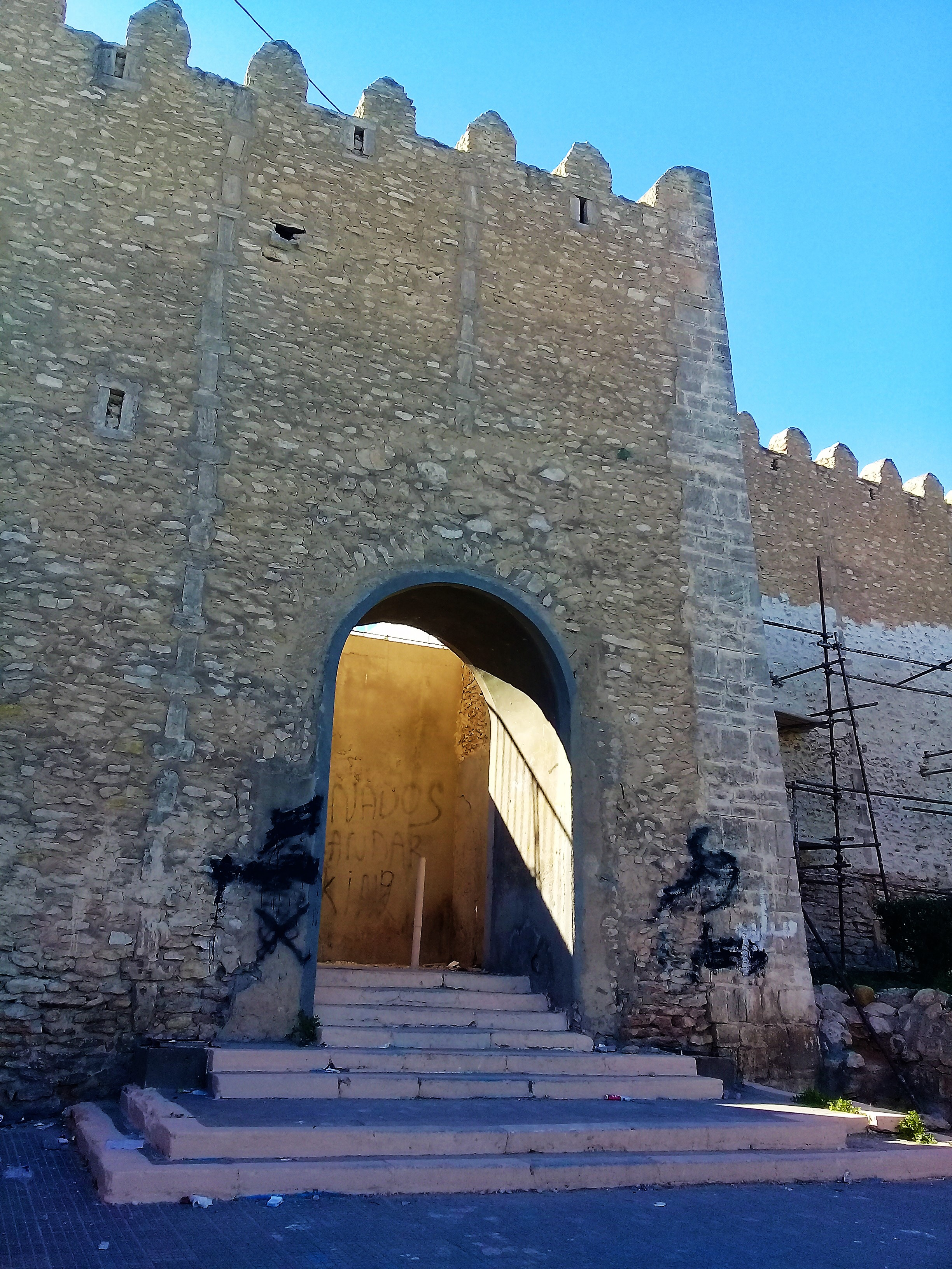 Entrée est de la médina de Sfax